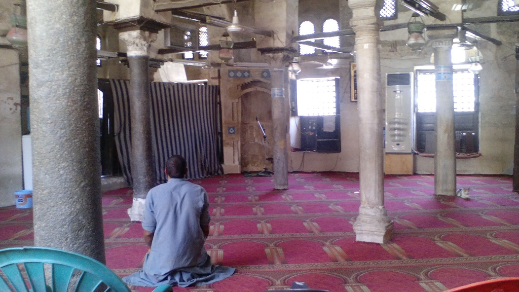 مسجد العمرواي بمحافظة المنيا